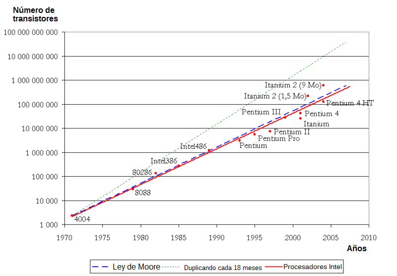 Ley de Moore